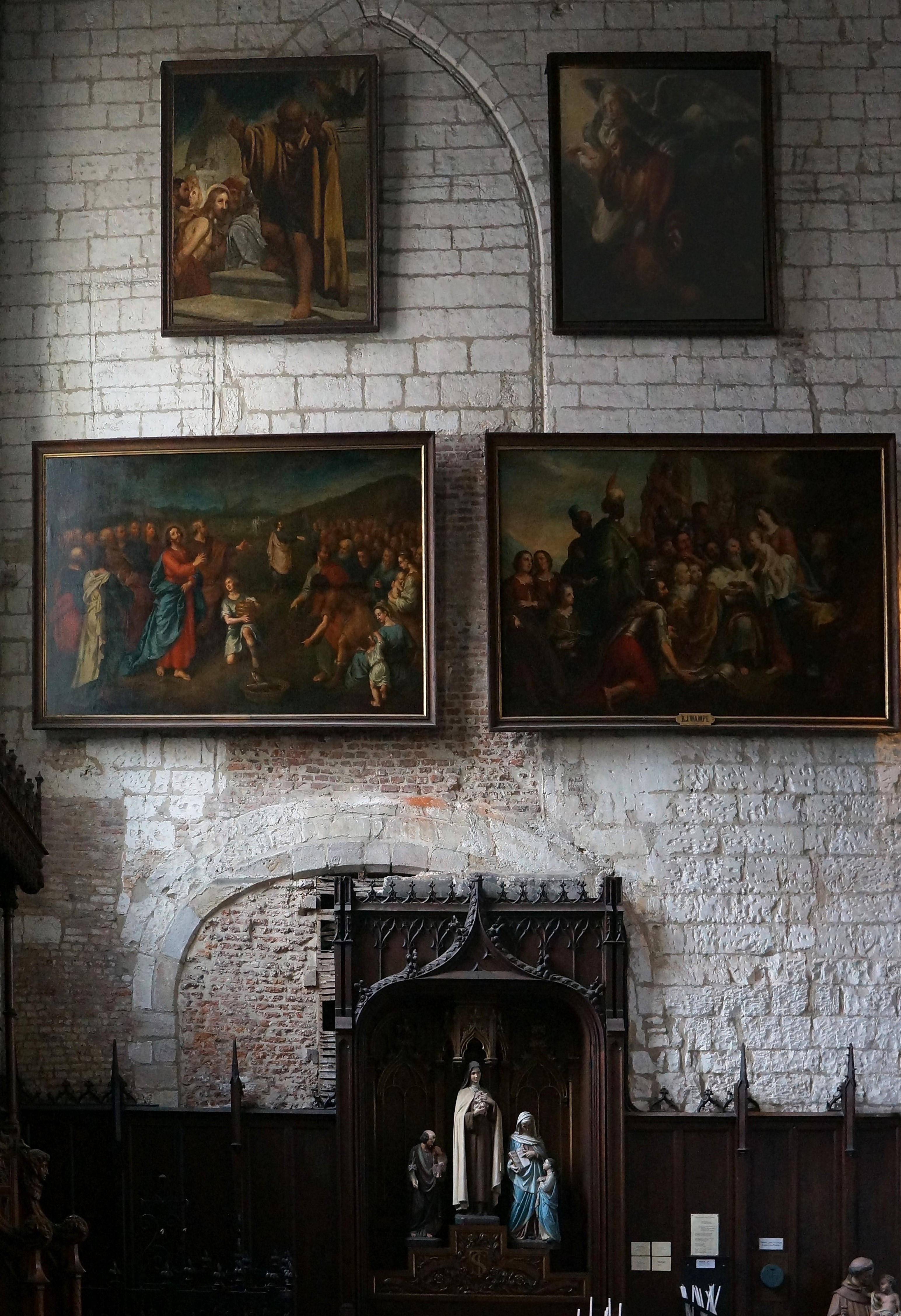 Tableau du haut à gauche: Le reniement de Saint Pierre This object is classé Monument Historique in the base Palissy, database of the French furniture patrimony of the French ministry of culture, under the references PM59000833 and IM59001533. , en haut à droite: Christ au Mont des Olivier Victor Mottez (1809–1897) Alternative names Victor-Louis MottezDescriptionFrench painterDate of birth/death 13 February 1809 7 June 1897Location of birth/death Lille BièvresAuthority control : Q668411 VIAF: 47840743 ISNI: 0000 0001 0897 2857 ULAN: 500020891 LCCN: nb2007019644 GND: 129404896 WorldCat creator QS:P170,Q668411 Tableau du bas à gauche: "La multiplication des pains" de Pierre Michel Le Bouteux This object is classé Monument Historique in the base Palissy, database of the French furniture patrimony of the French ministry of culture, under the references PM59000830 and IM59001531. Tableau du bas à droite: "L'adoration des Mages" de Bernard-Joseph Wamps This object is classé Monument Historique in the base Palissy, database of the French furniture patrimony of the French ministry of culture, under the references PM59000829 and IM59001532. Retable de sainte Thérèse de l'Enfant Jésus Église Sainte-Catherine de Lille Vieux-Lille Nord (département français)